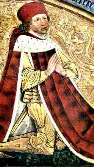 Albrecht Achilles (afbeelding uit 1484, dus geen copyright)